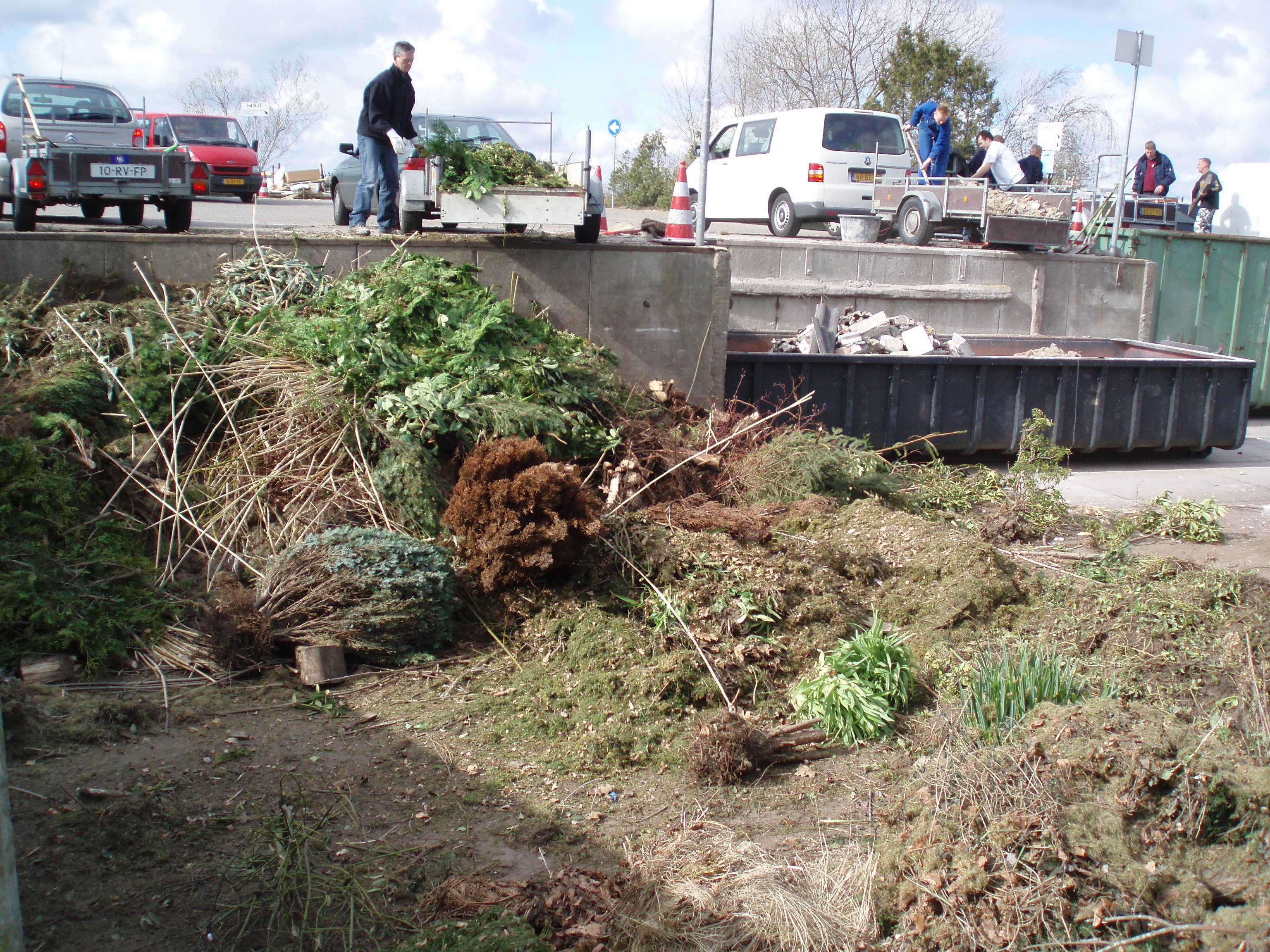 Recyclagepark Fort Verlaat in Coevorden